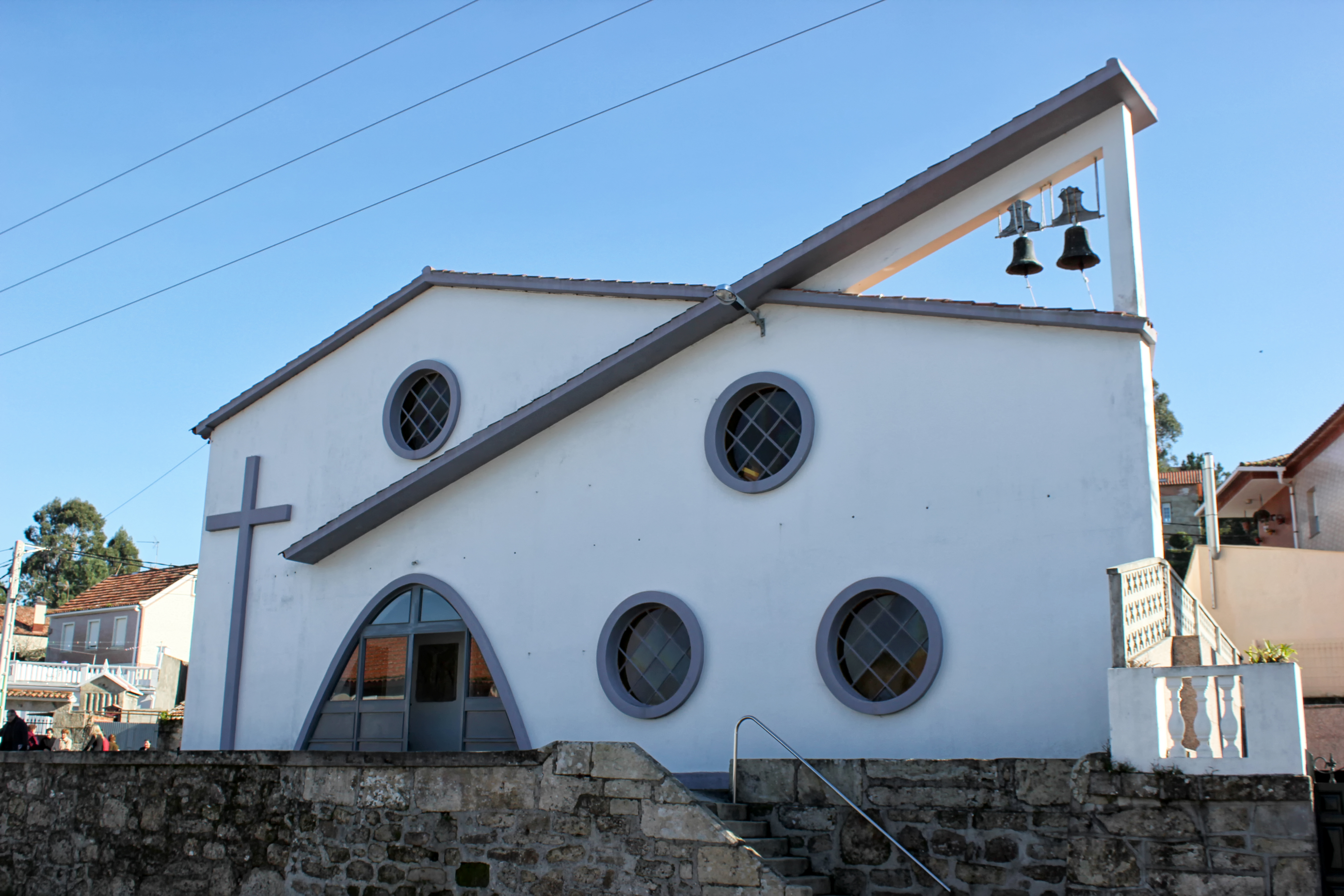 Igrexa de Mogor, Marín.